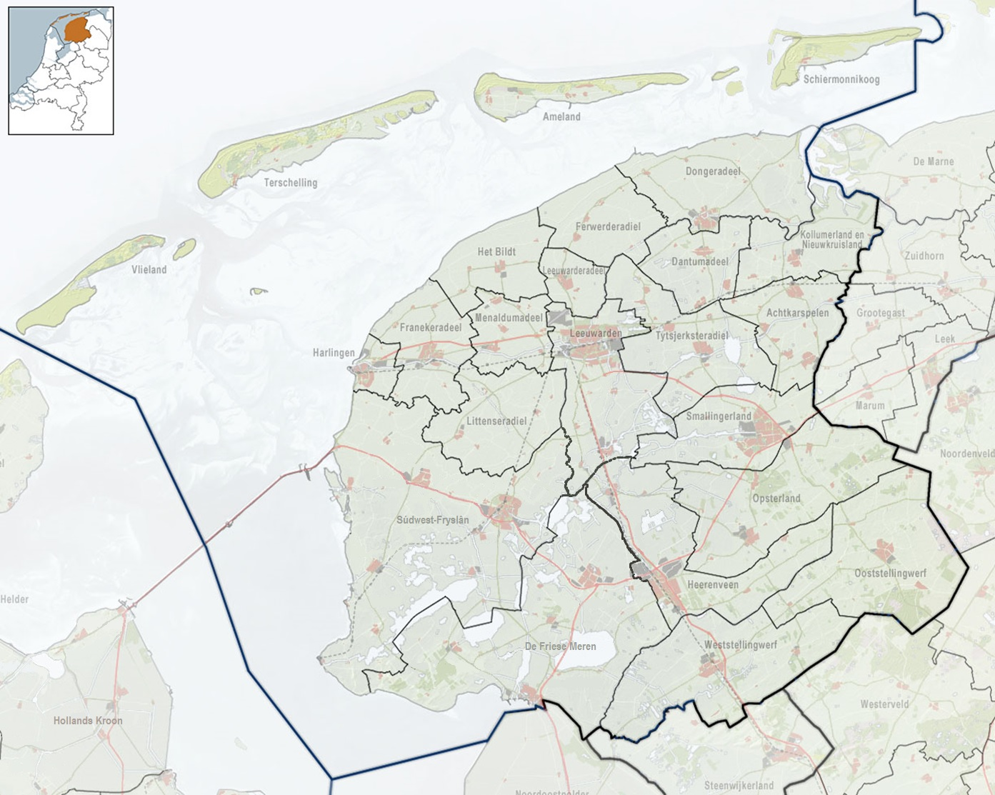 Referentiekaart van Provincie Fryslân, met indeling van gemeenten (2010) en impressie van het landschap. Door Jan-Willem van Aalst, samengesteld uit publiek beschikbare geo-data: Referentie-ondergrond (kustlijn, steden, wegen) gerasterd uit de OpenStreet Map OSM. ( Inhoud is beschikbaar onder de Creative Commons Attribution-ShareAlike 3.0 license. Referentie-ondergrond op water bewerkt vanuit Gebruik is vrij met bronvermelding NLR en ESA. Vectorgrenzen van gemeenten en regio's vrij ter beschikking gesteld met dank aan cartografen van brandweerregio's Hollands-Midden en IJsselland; gerasterd in Photoshop. Hoogte-aanduidingen (reliëf) gerasterd uit de AHN Viewer ( gebruik is vrij met bronvermelding (c) AHN, Overige kenmerken op de kaart: eigen tekenwerk van Jan-Willem van Aalst, op basis van gerasterde gemeentegrenzen.